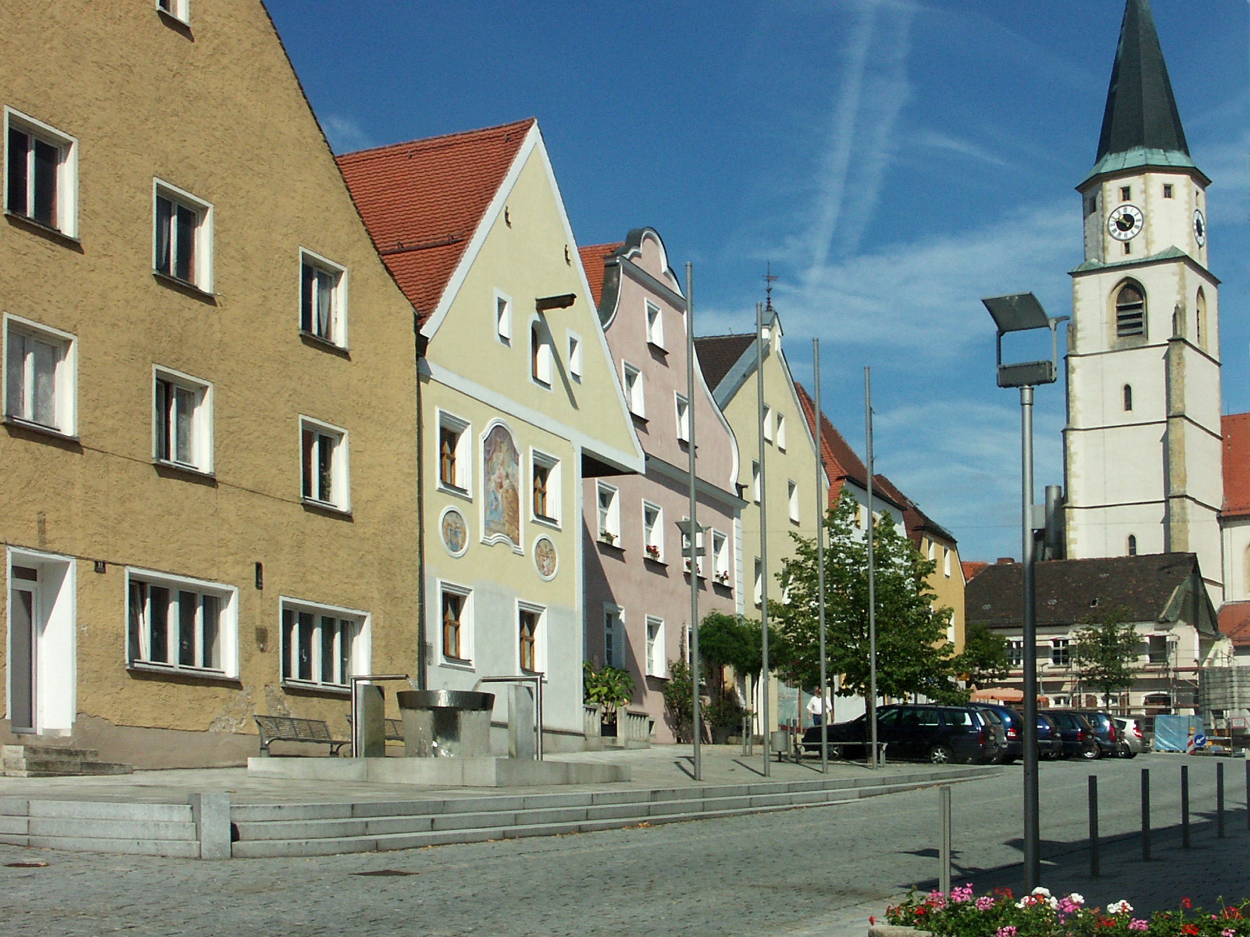 Nabburg - Oberer Markt mit Stadtpfarrkirche